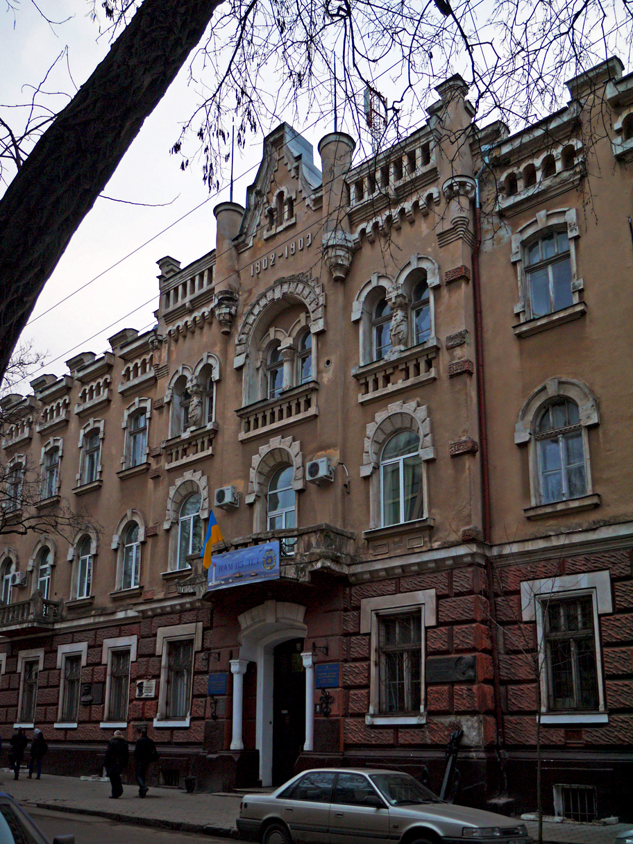 Будівля училища торгівельного мореплавства, де навчались:- О.І. Марінеско - підводник, Герой Радянського Союзу;- О.К. Следзюк - Герой Соціалістичної Праці та інші, Одеса, Канатна вул., 8